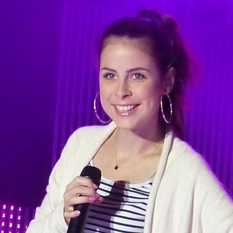 Lena Meyer-Landrut in Wernigerode September 2013 - Portrait